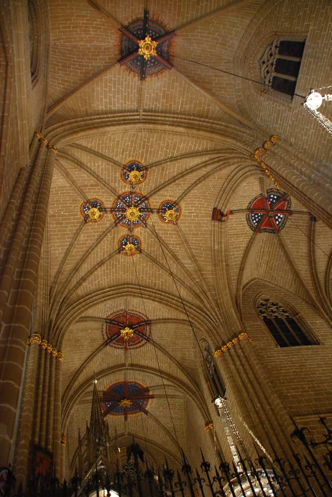 Crucero de la catedral de Pamplona